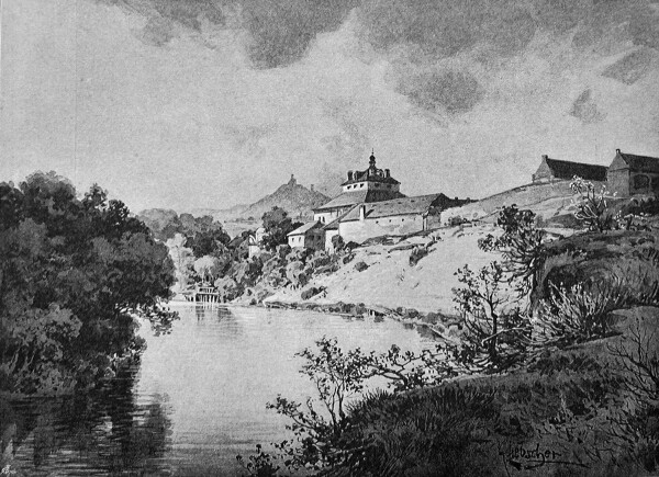 Pátek na Ohři